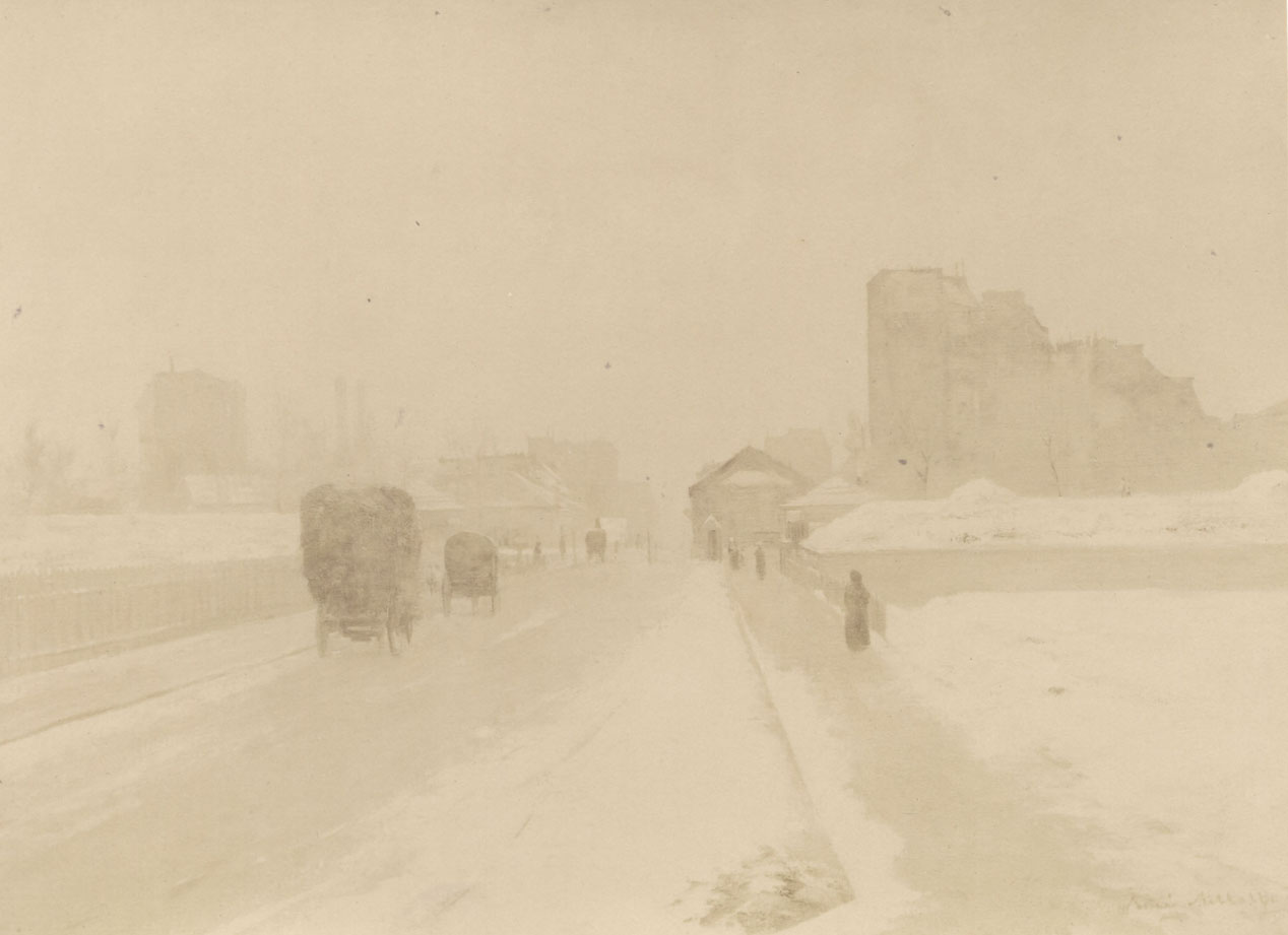 " La neige à la porte d'Asnières " HST;Sbg; Dim; H:59cm X L:80cm Acquis par l'État au Salon de 1890 Musée d'Orsay par le Musée du Louvre n° Inv: RF630